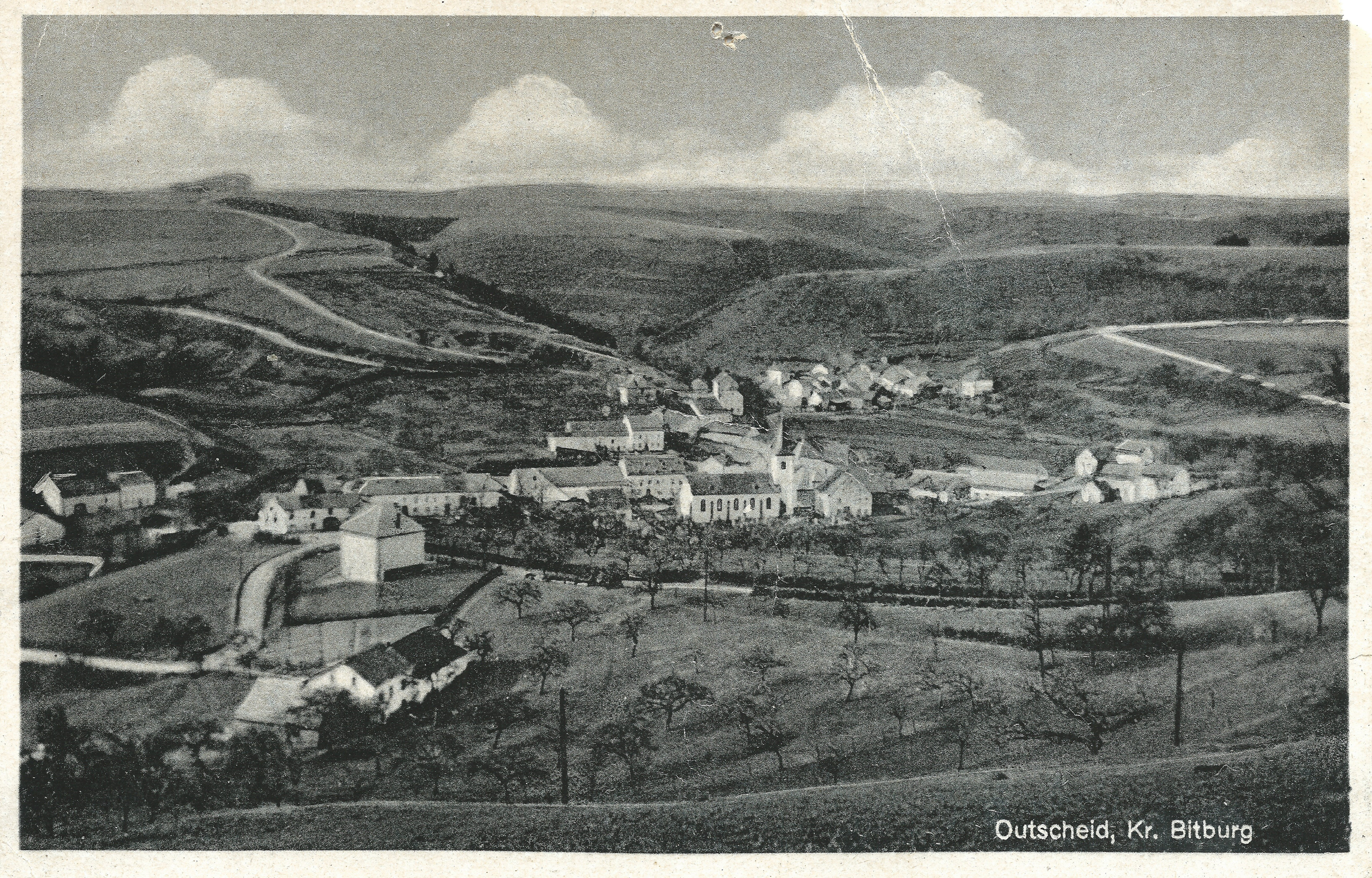 Historische Ansicht von Outscheid